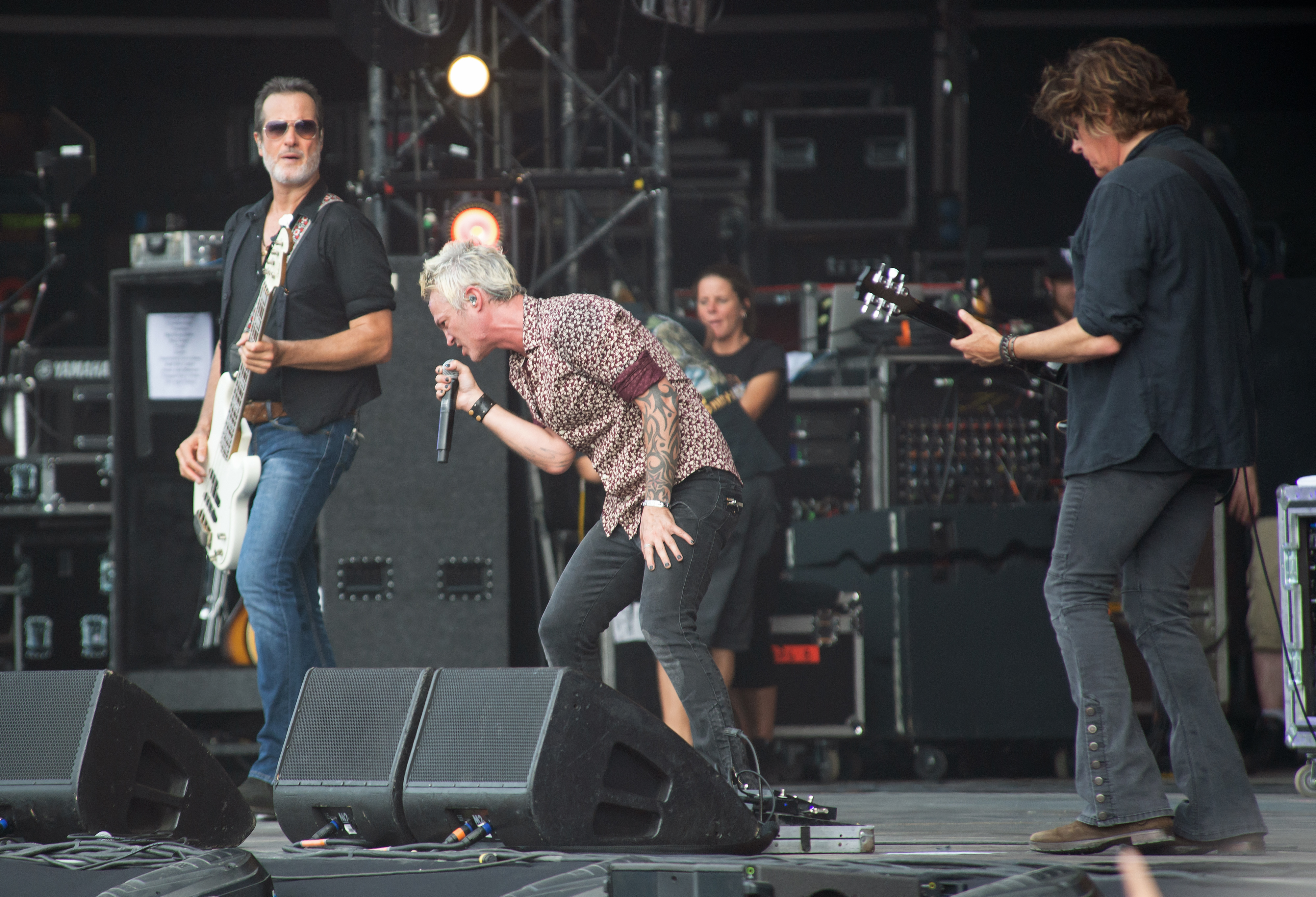 Concert du groupe Stone Temple Pilots au Hellfest 2019.